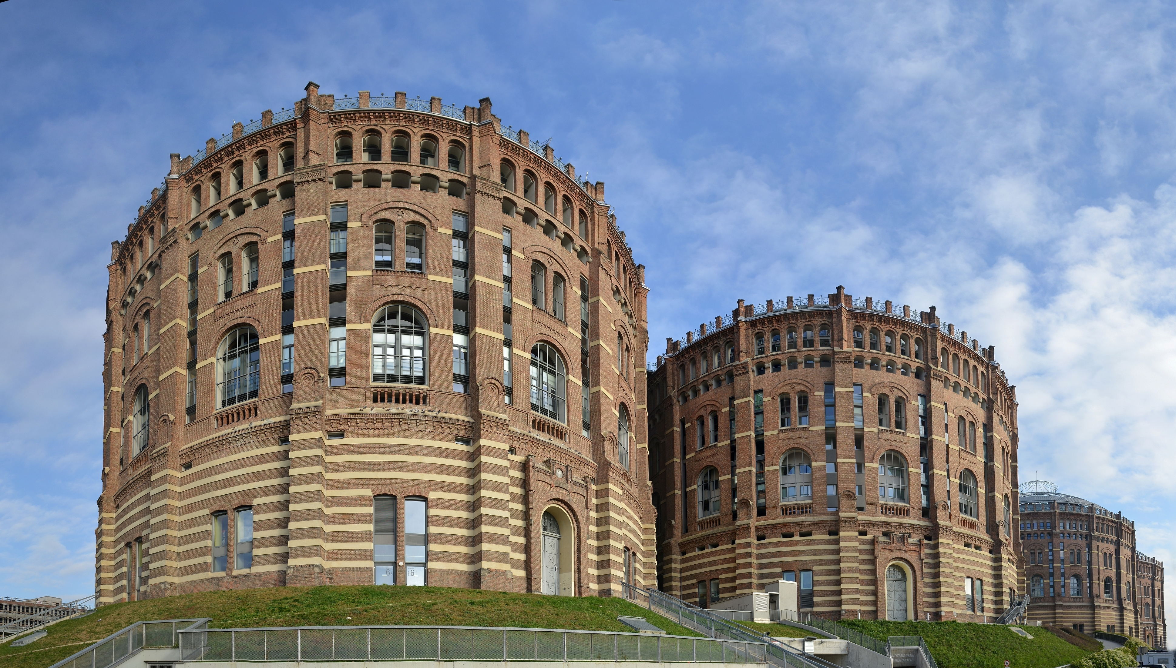 Die Gasometer (Teleskopgasbehälterder) an der Guglgasse 6, 8, 12, 14 in Wien Simmering. Die vier Gasbehälter des Gaswerks Simmering wurden 1896 errichtet. Nach ihrer Stilllegung im Jahr 1984 wurden sie schließlich von 1999 bis 2001 umgebaut und beherbergen heute unter anderem Wohnhausanlagen, ein Einkaufszentrum und eine Veranstaltungshalle.